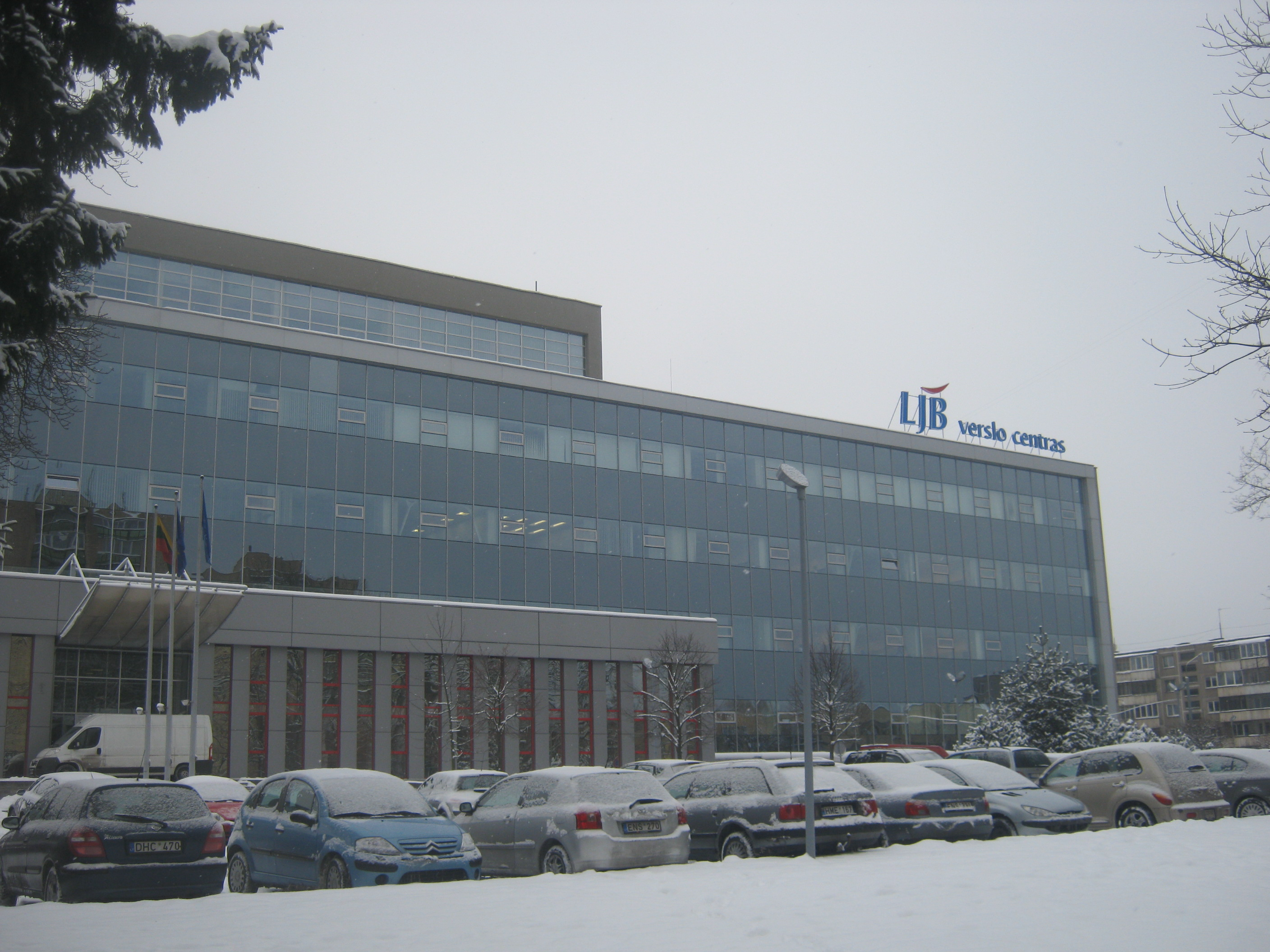 Vilnius